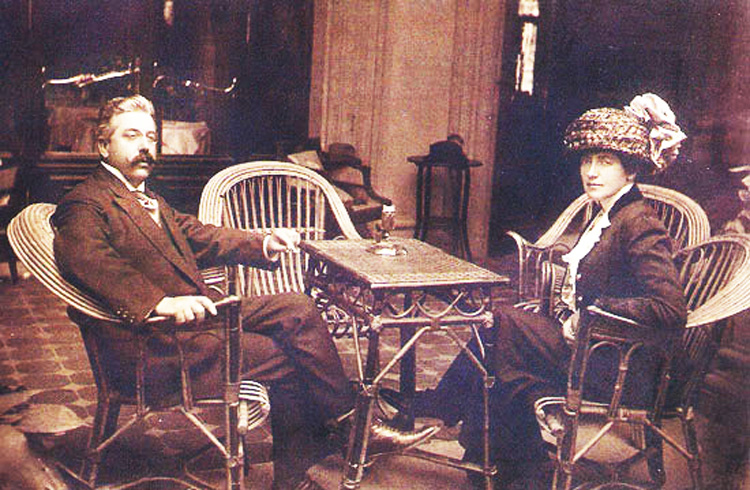 Соломія Крушельницька з чоловіком Чезаре Річчоні. Віареджо, 1920-ті роки